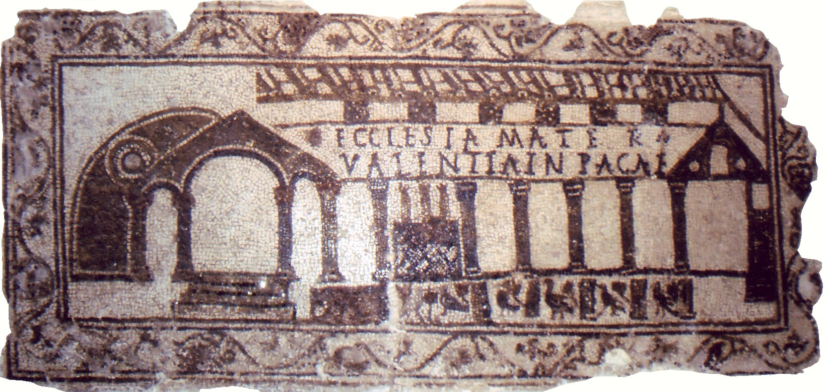 Basilica cristiana proveniente da pietra tombale di Tabarka conservata al Bardo di Tunisi